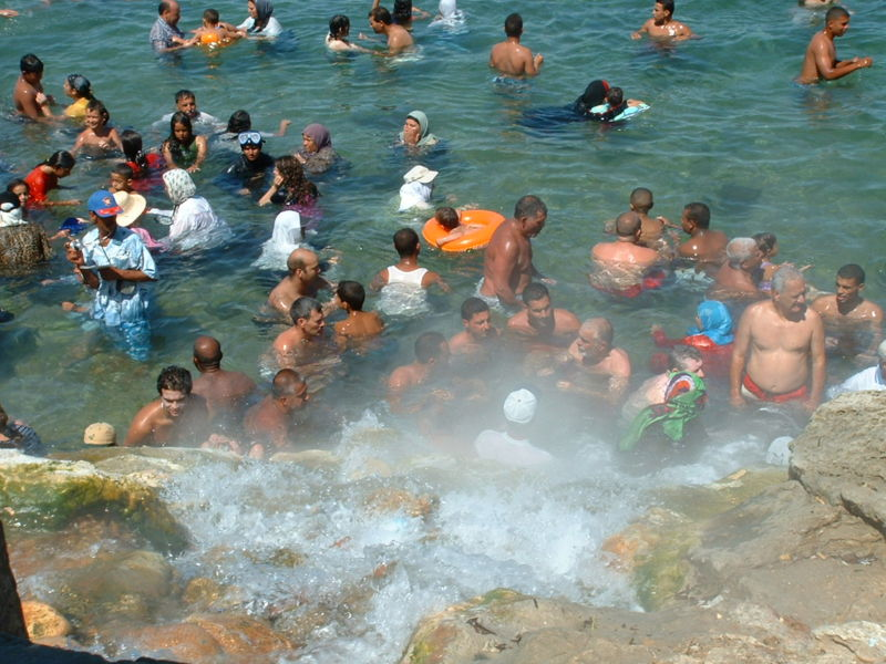 Photographie personnelle prise près de Korbous (Tunisie), illustrant une baignade populaire dans l'une des sources d'eau chaude